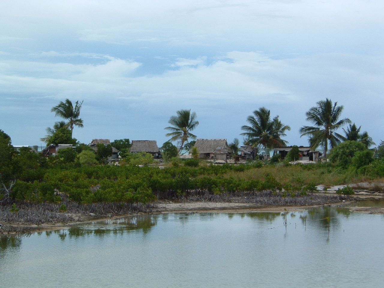 Tarawa, Kiribati